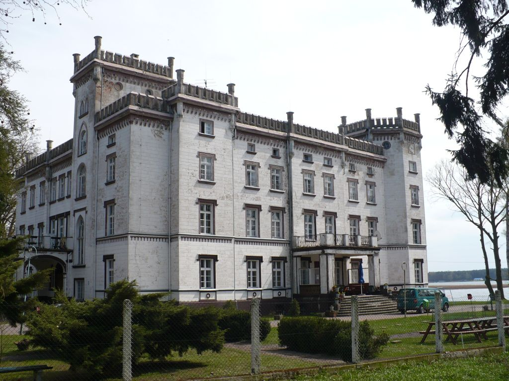 Pałac w Przełazach